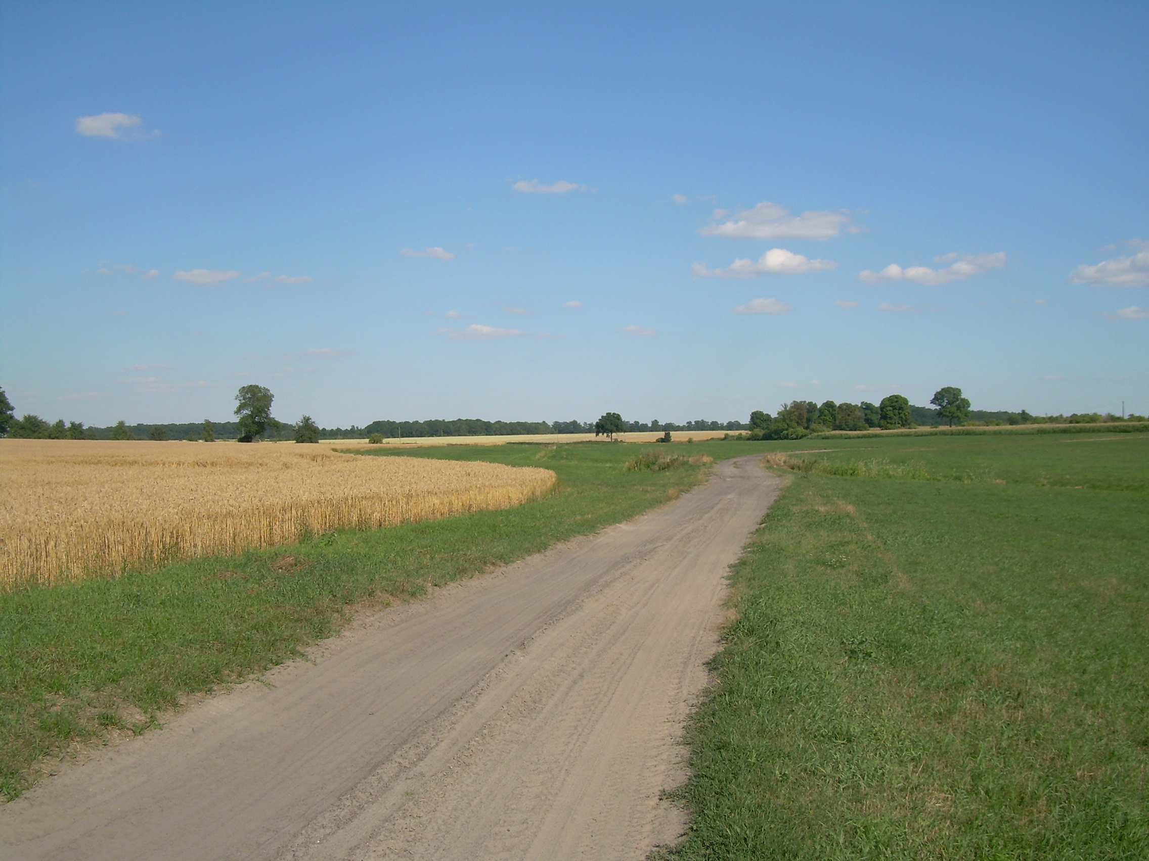 Pawłówek